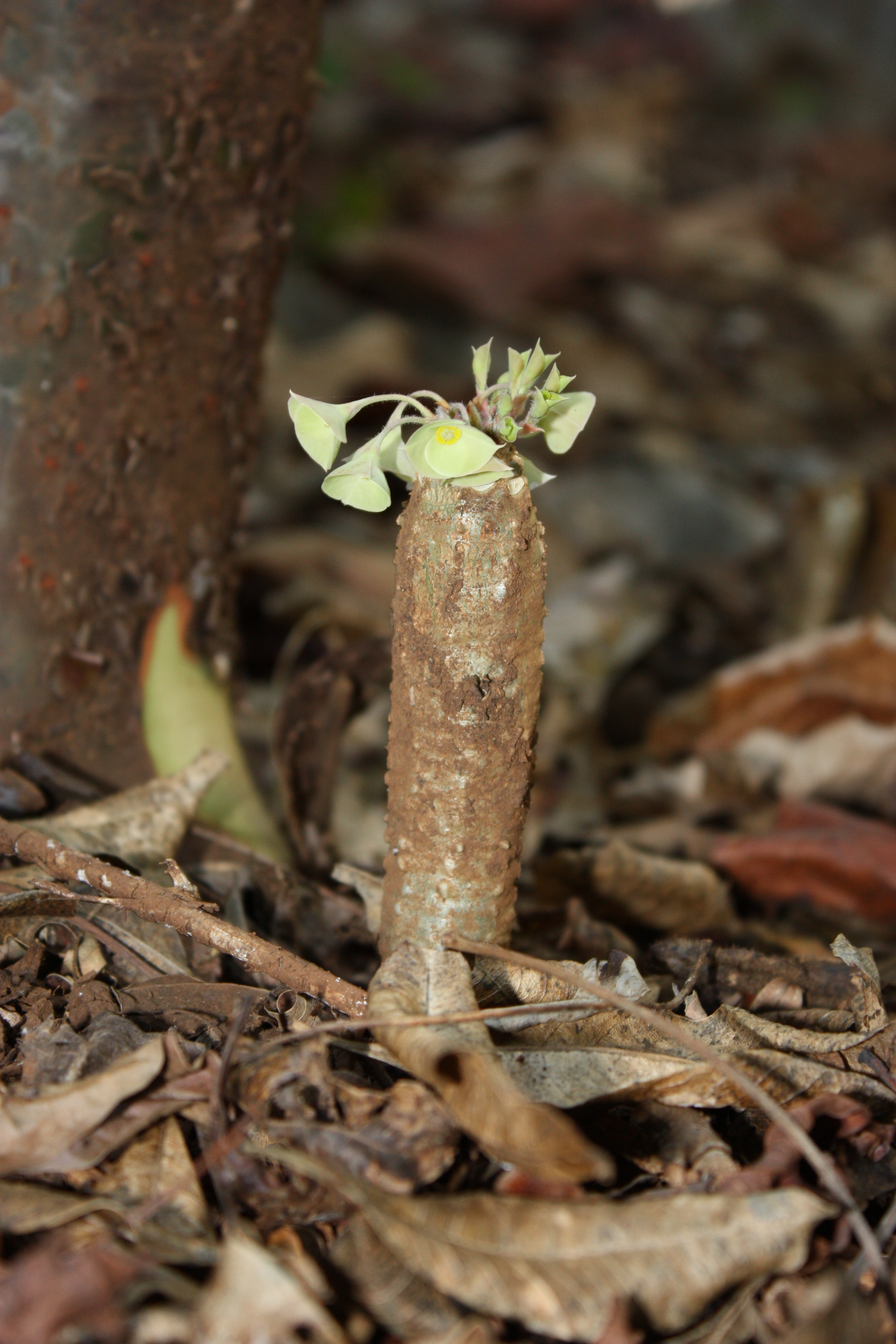 flowering Euphorbia ankarensis BoiteauAnkarana, N Madagascar